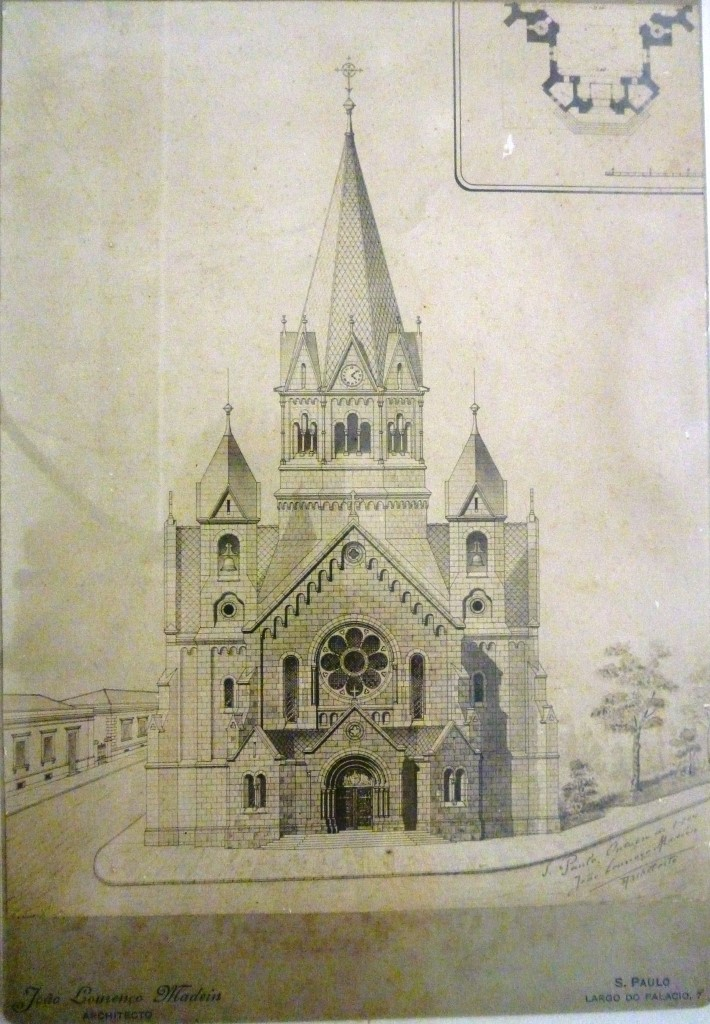 Projeto da fachada da Igreja de Santa Efigênia - Vista frontal